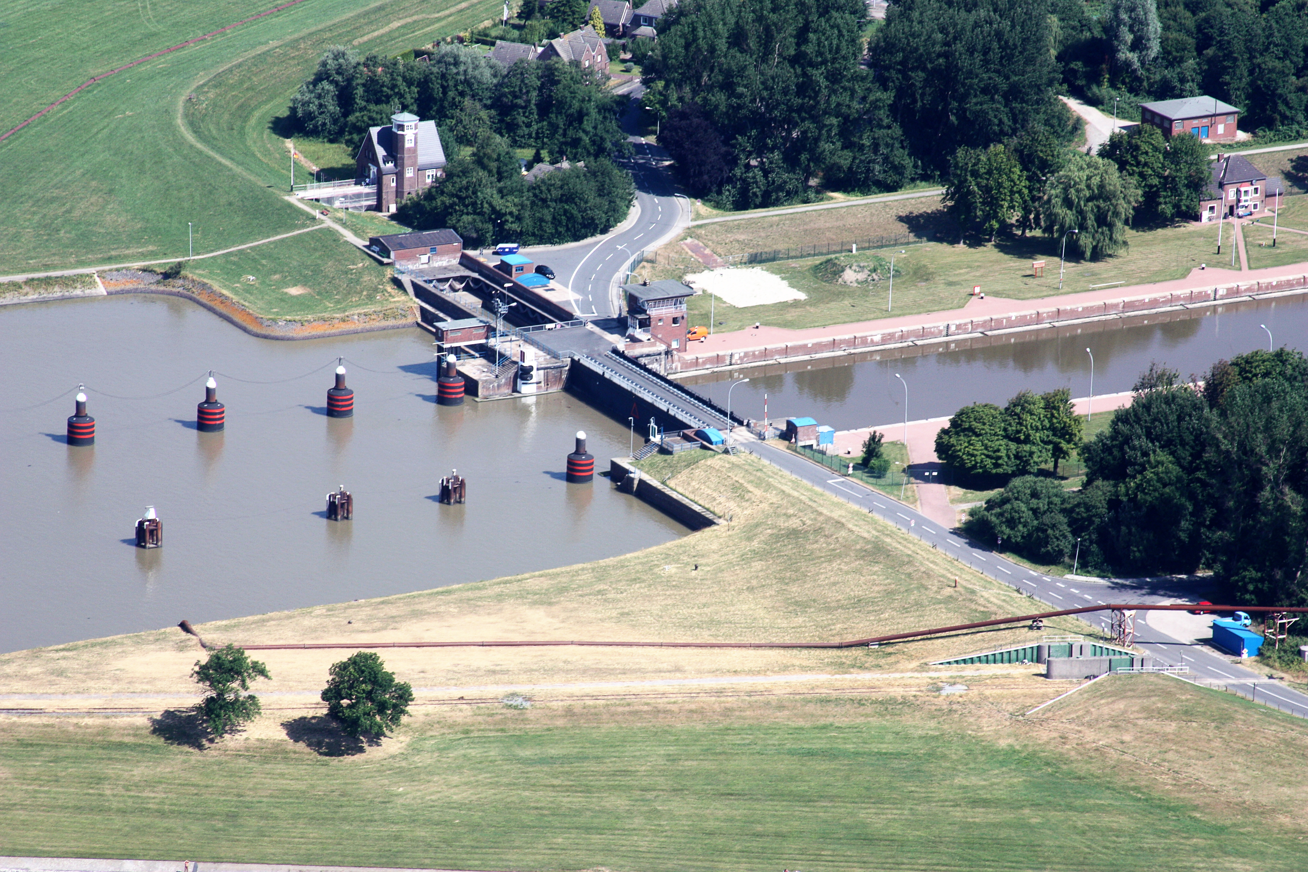 Flug über Emden; Flughöhe 1500 ft; Juli 2010; Originalfoto bearbeitet: Tonwertkorrektur und Bild geschärft mit Hochpassfilter